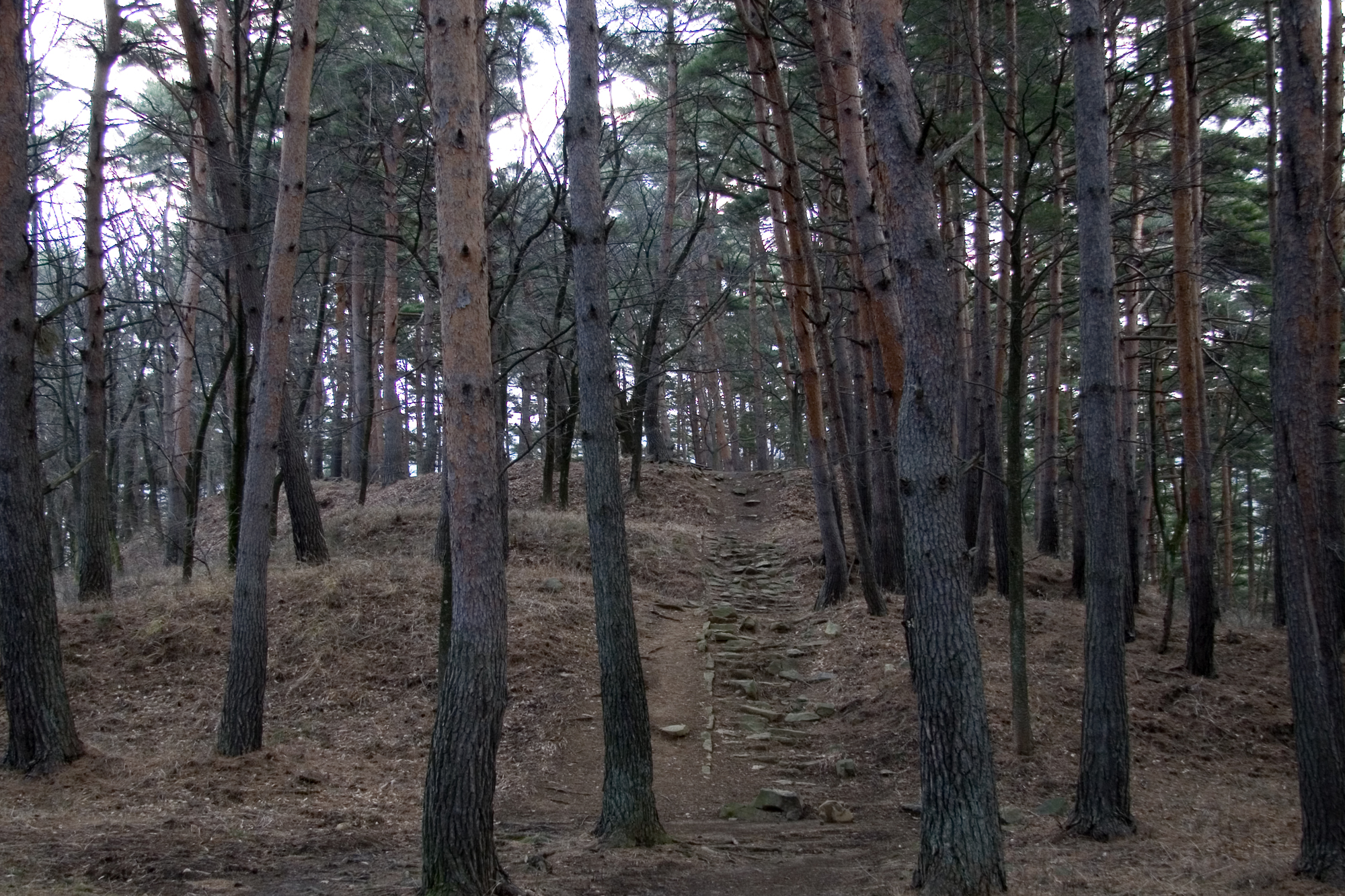 林城（大城）